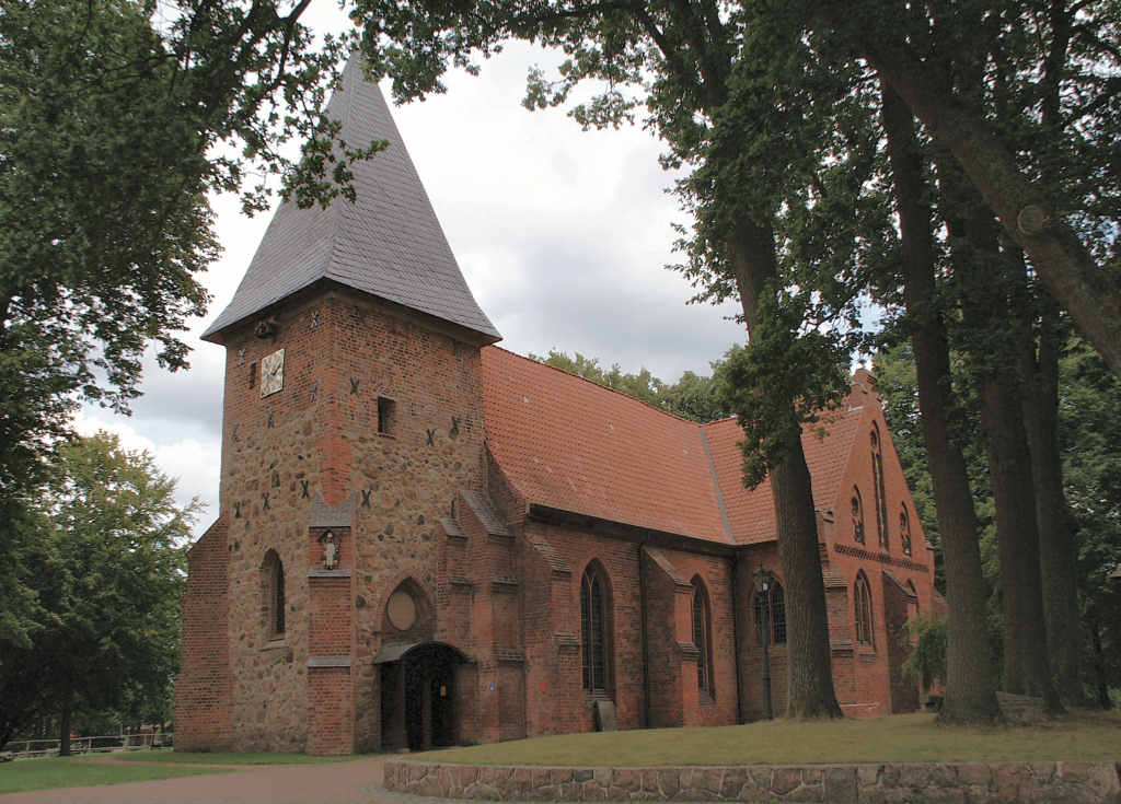 St. Urbani Kirche in Munster